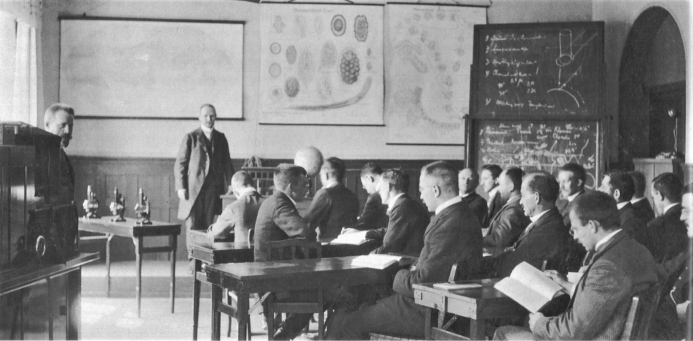 Tübingen. Tropenkurse für das Fachpersonal des Tropengensungsheims bei_Difäm.